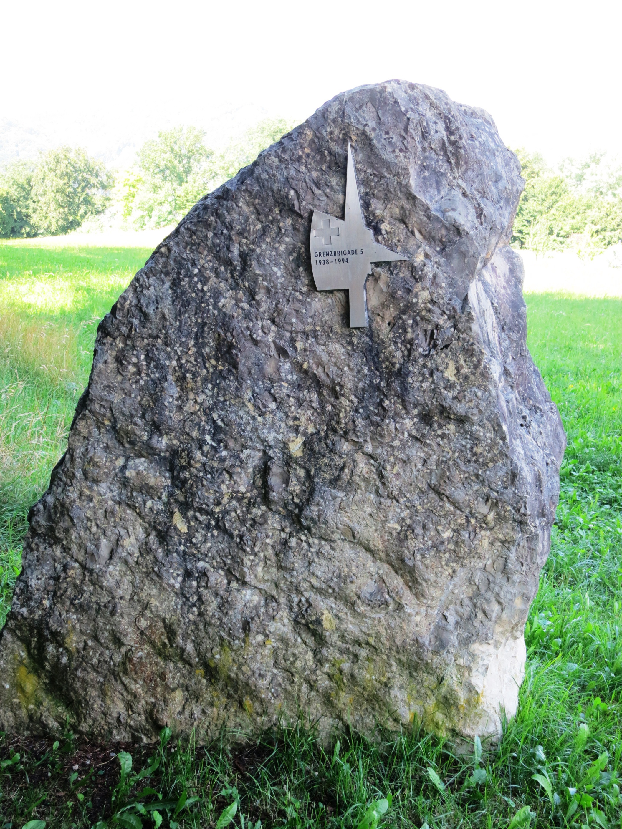 Gedenkstein Grenzbrigade 5: 1938-1994 bei 47°30'22" N, 8°13'37" E